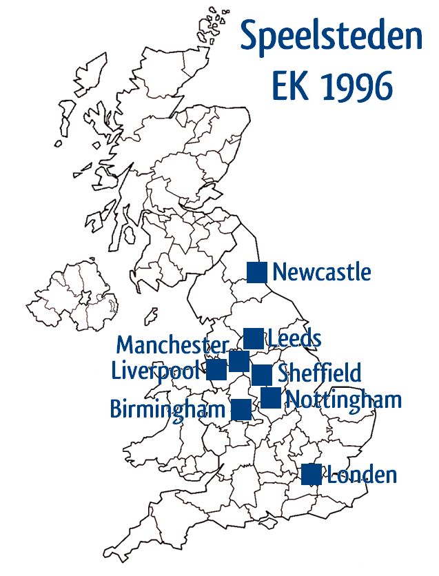 Speelsteden tijdens het EK 1996 in Engeland